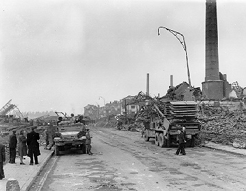 Vernielde spoorbrug (links) en fabrieksinstallaties van de tegelfabriek Rema (rechts) en de Maastrichtsche Zinkwit Maatschappij (verderop rechts) aan de Franciscus Romanusweg in Maastricht. Het Amerikaanse transport is bedoeld voor de bouw van de pontonbrug noord; links een "half track" met luchtafweergeschut. Fotocollectie RHCL Maastricht, GAM 173.